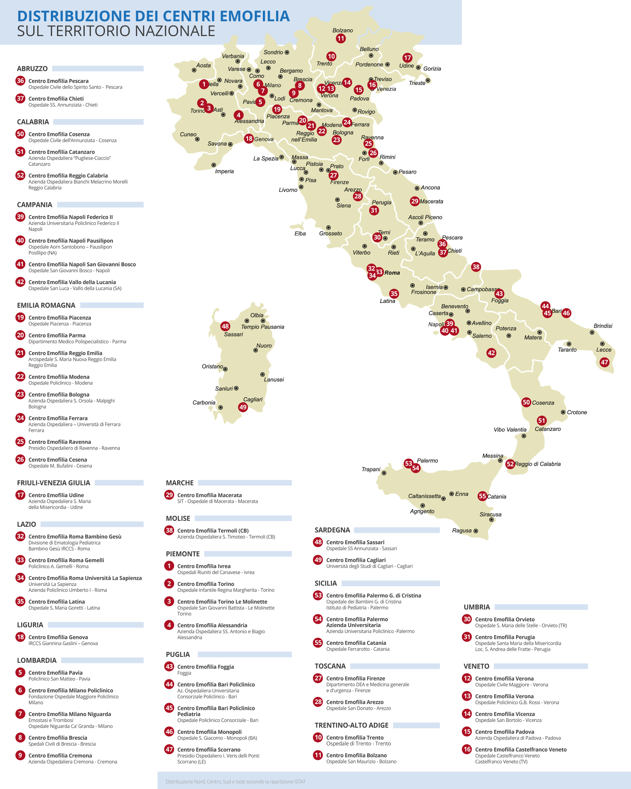 La Mappa aggiornata dei centri emofilia presenti sul territorio nazionale.